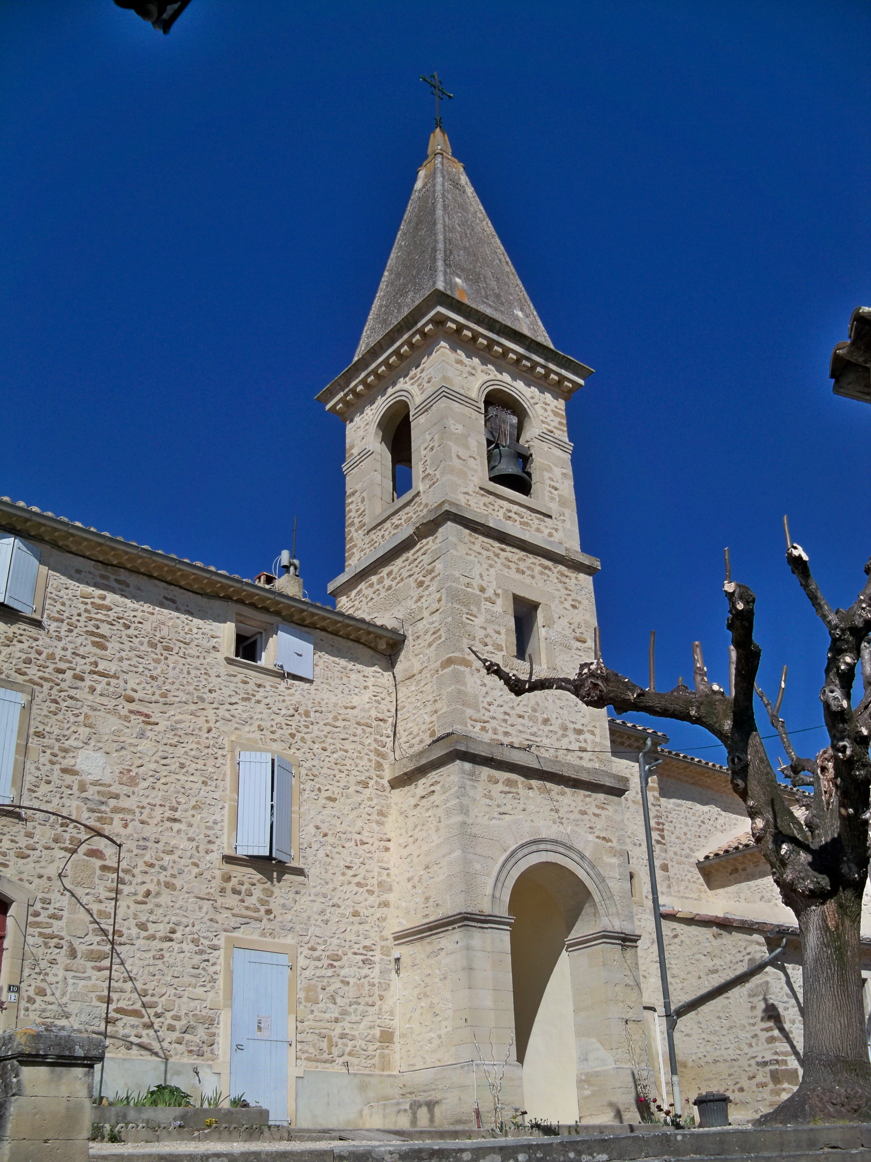 église de Saint Pantaléon (26)